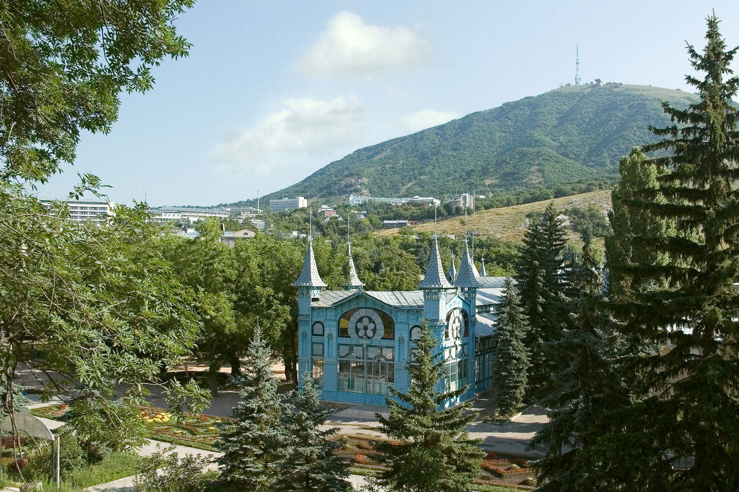 Лермонтовская галерея в Пятигорске